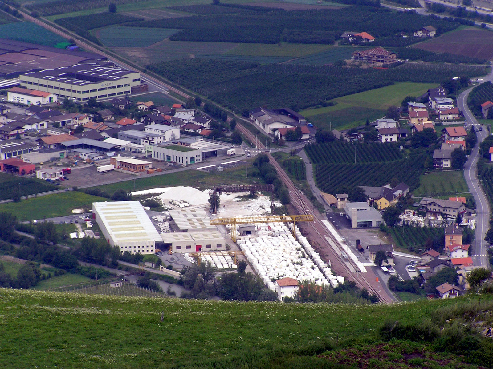 Die Marmorfabrik im Tal von Laas